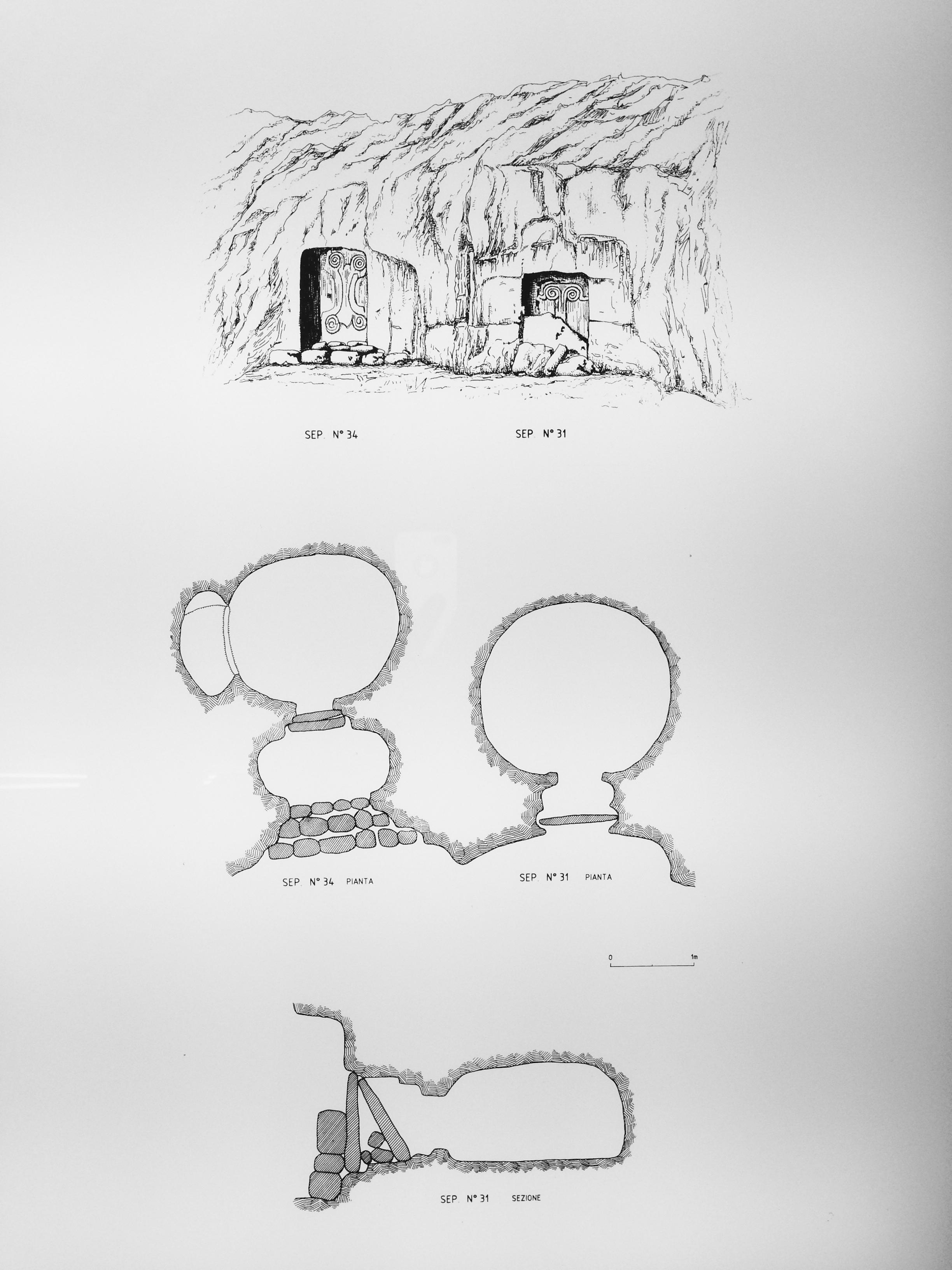 disegno tombe castellucciane, dal Museo Paolo Orsi